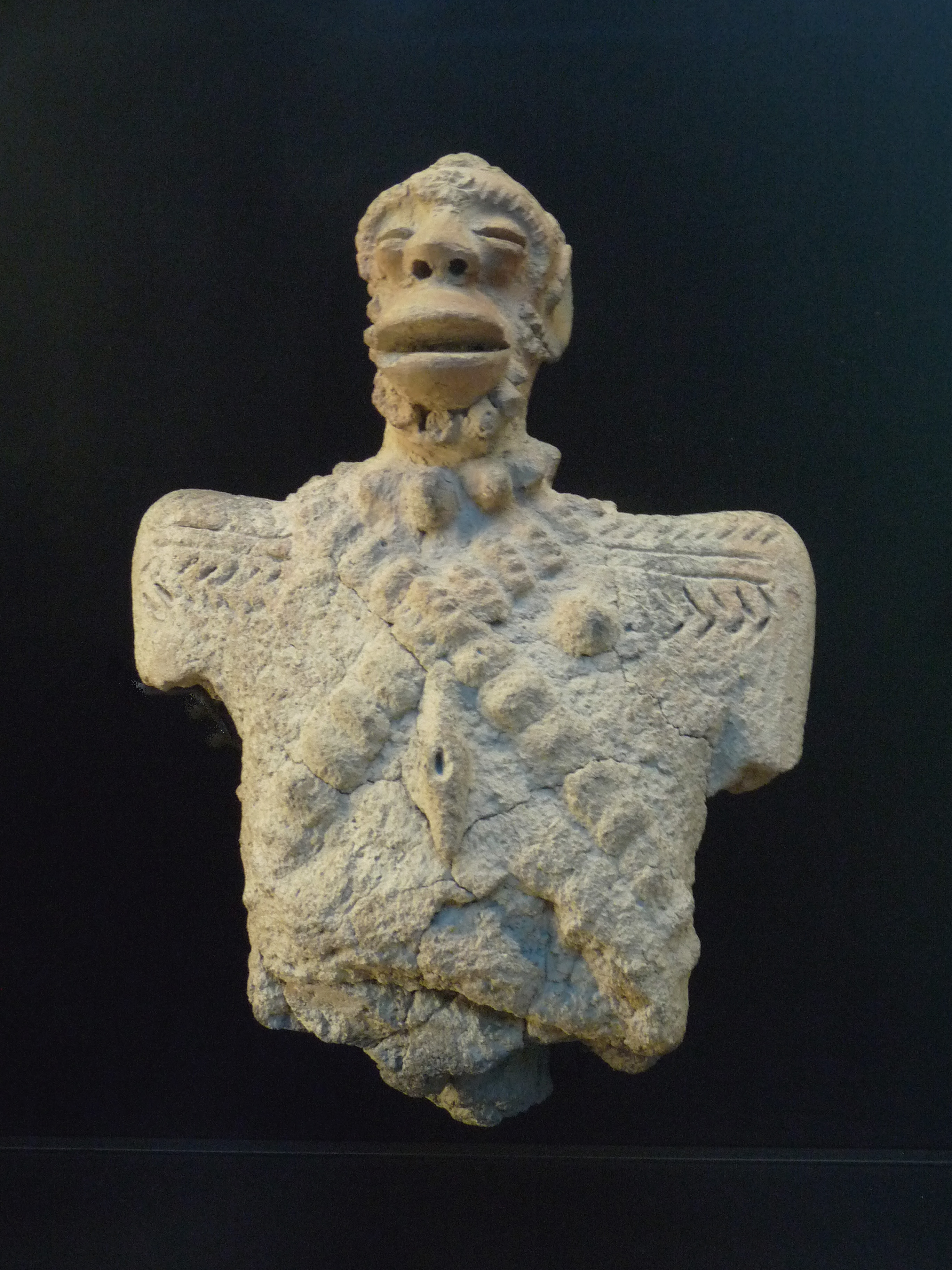 Figurines anthropomorphes, culture Sao, 9e-16e siècle, Tchad, terre cuite. Mission Jean-Paul Lebeuf, 1947-1948. Musée du quai Branly.